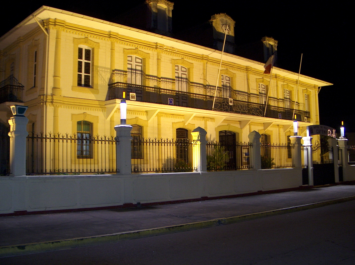 Hôtel de ville de Cayenne